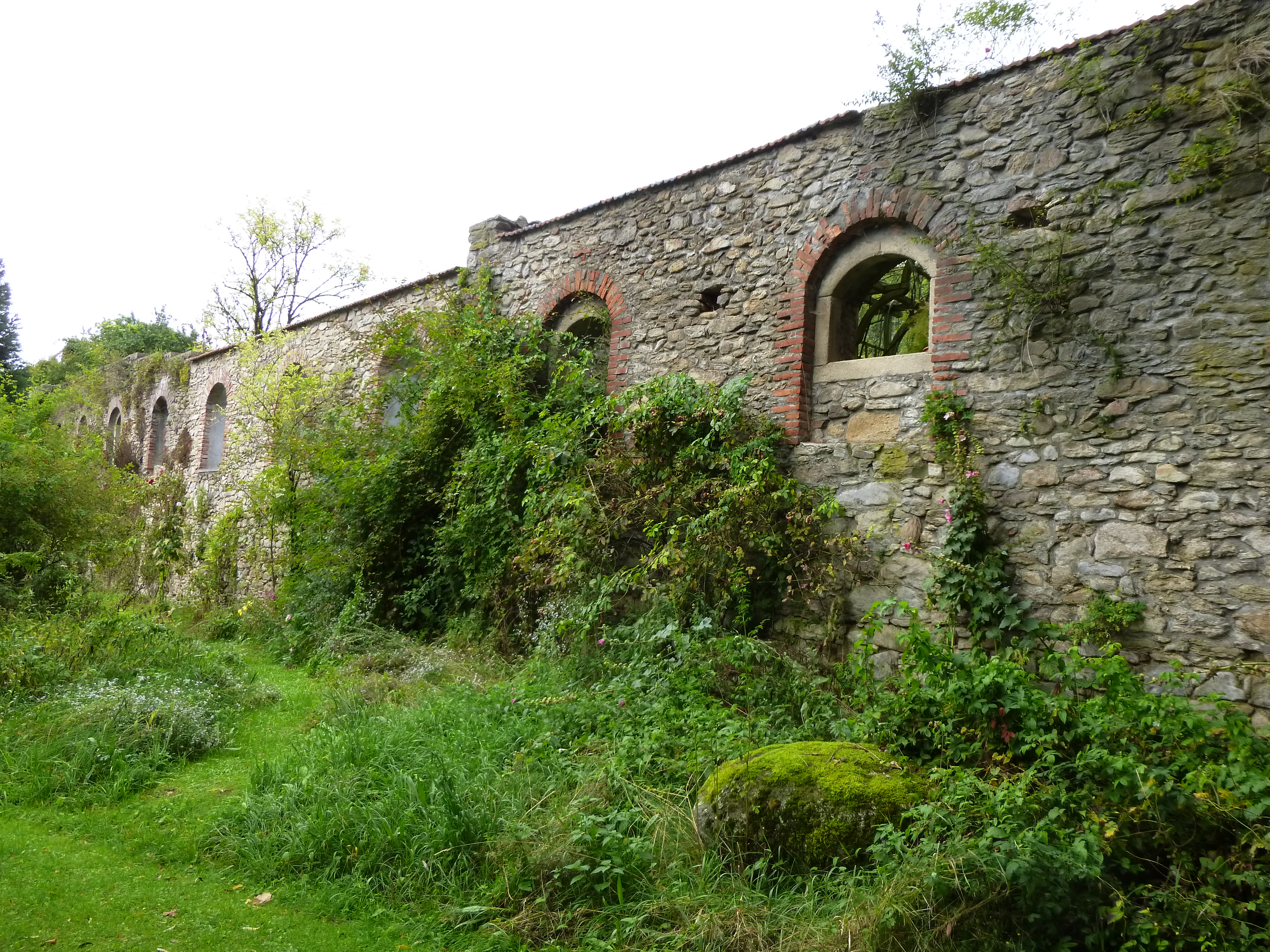 Die Mauerreste der frühmittelalterlichen und 1469 zerstörten Anlage befinden sich am Südrand des gleichnamigen Berges. Liste der Baudenkmäler der Marktgemeinde Schwarzach.